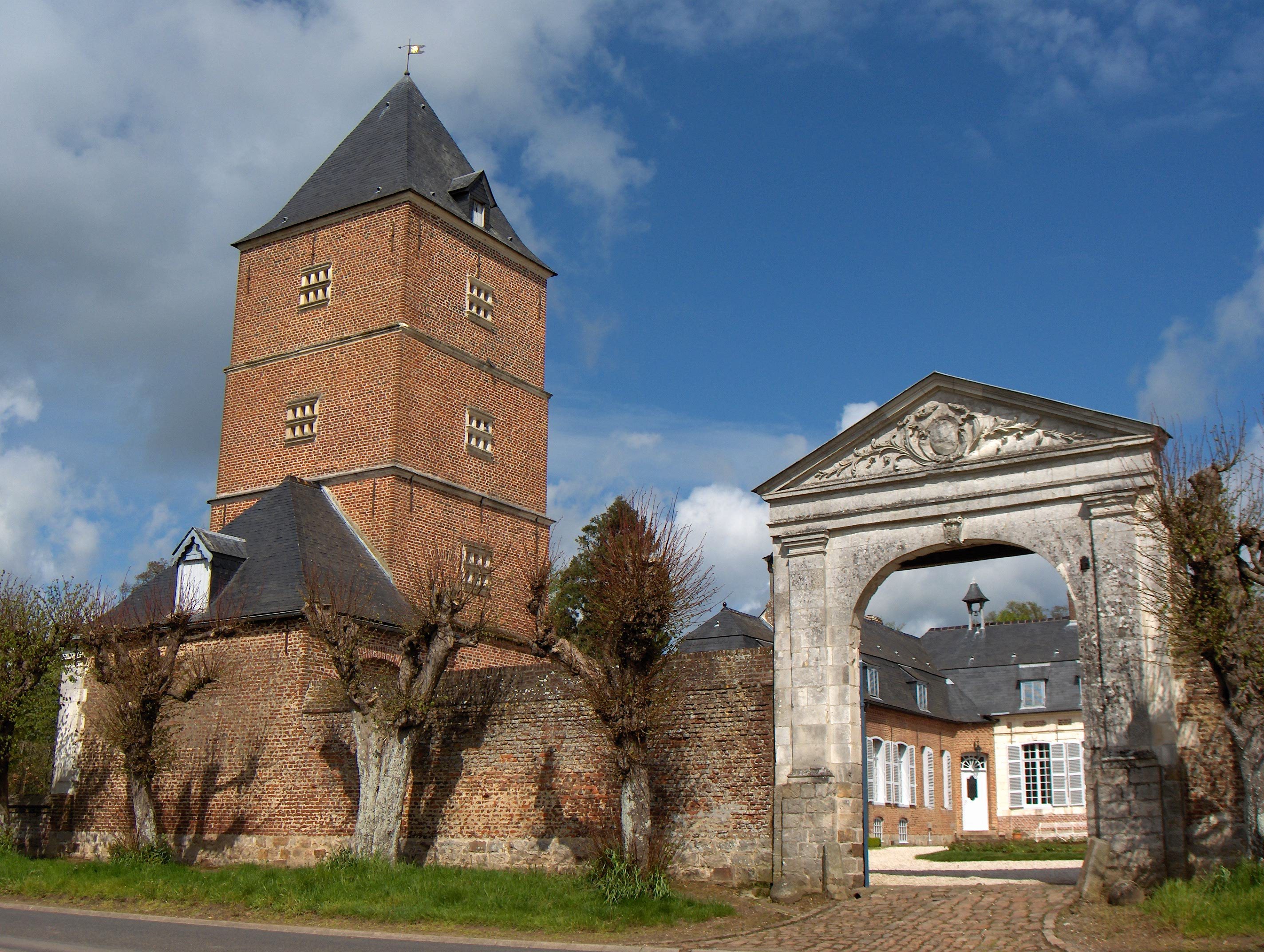 Rivière (dépt. Pas-de-Calais, France) château de Grosville (XVIIIe siècle, colombier + portail)